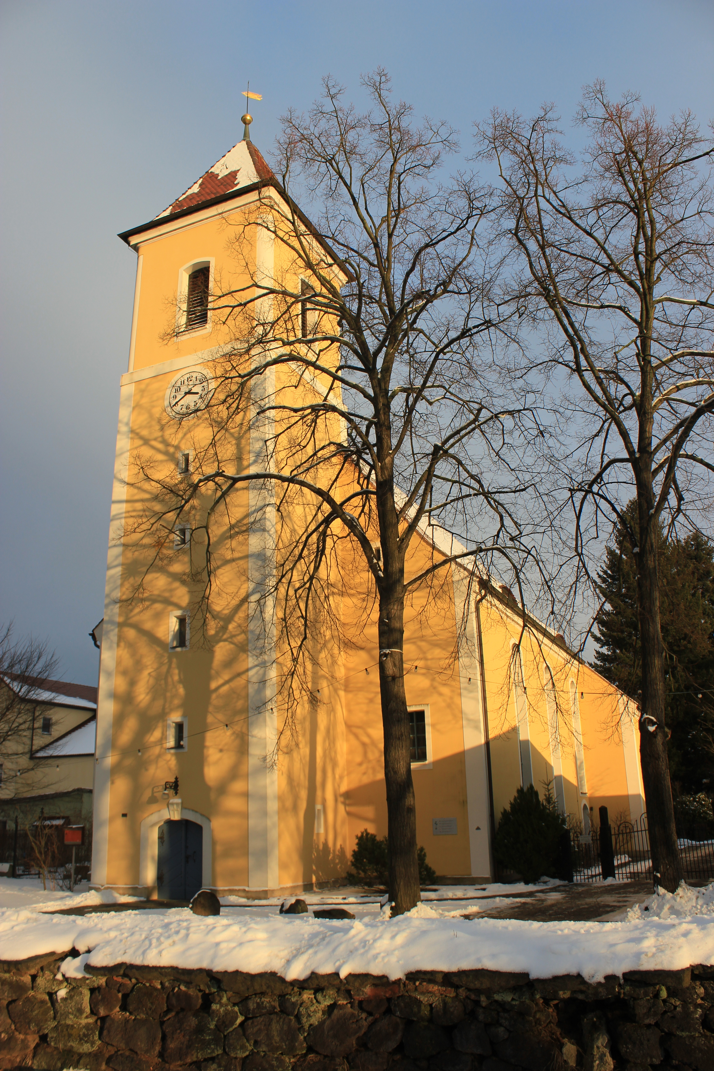 Hornjoserbsce: Ewangelska cyrkej we Łazu.